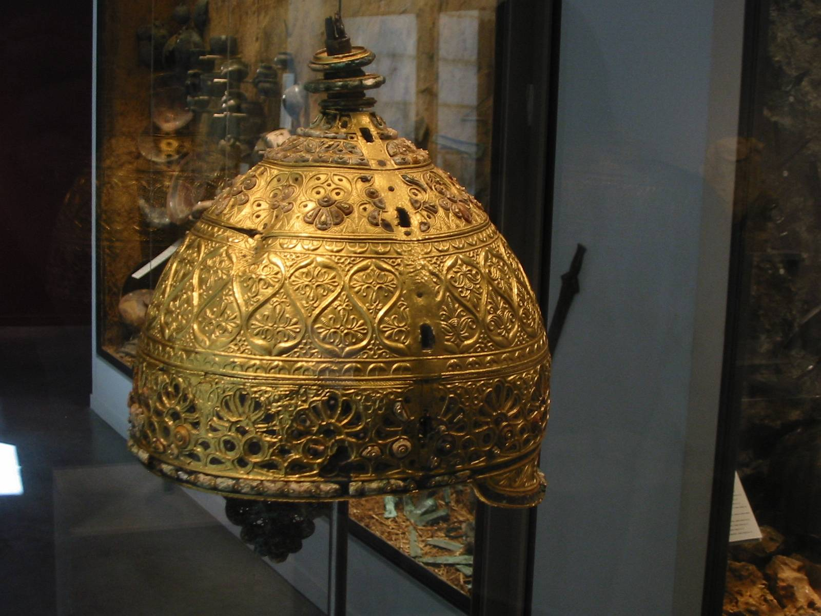 casque gaulois d'Agris, musée d'Angoulême, France